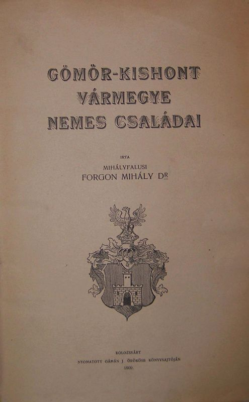 A Gömör-Kishont vármegye nemes családai című könyv címlapja